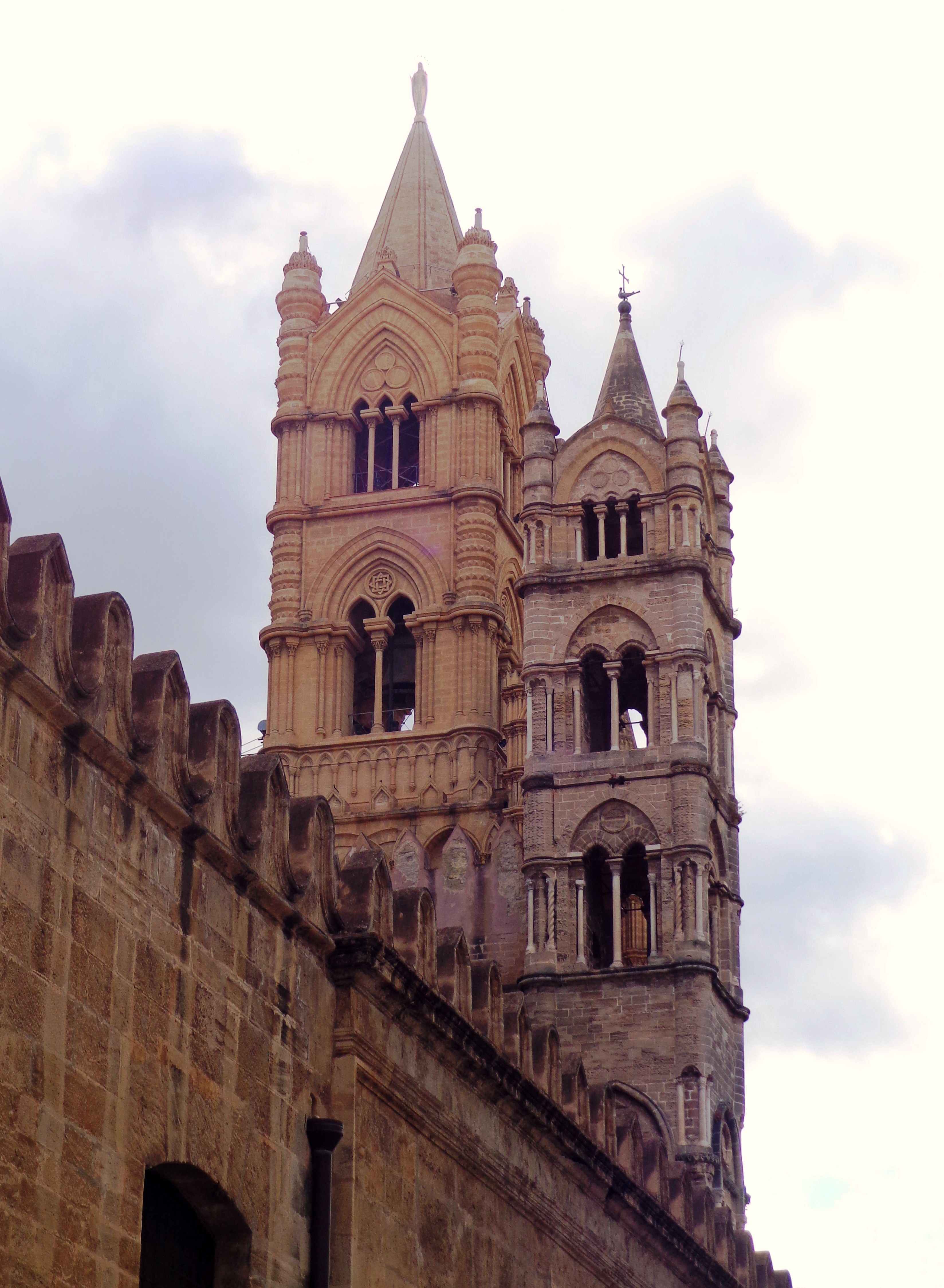 Campanili di via Bonello